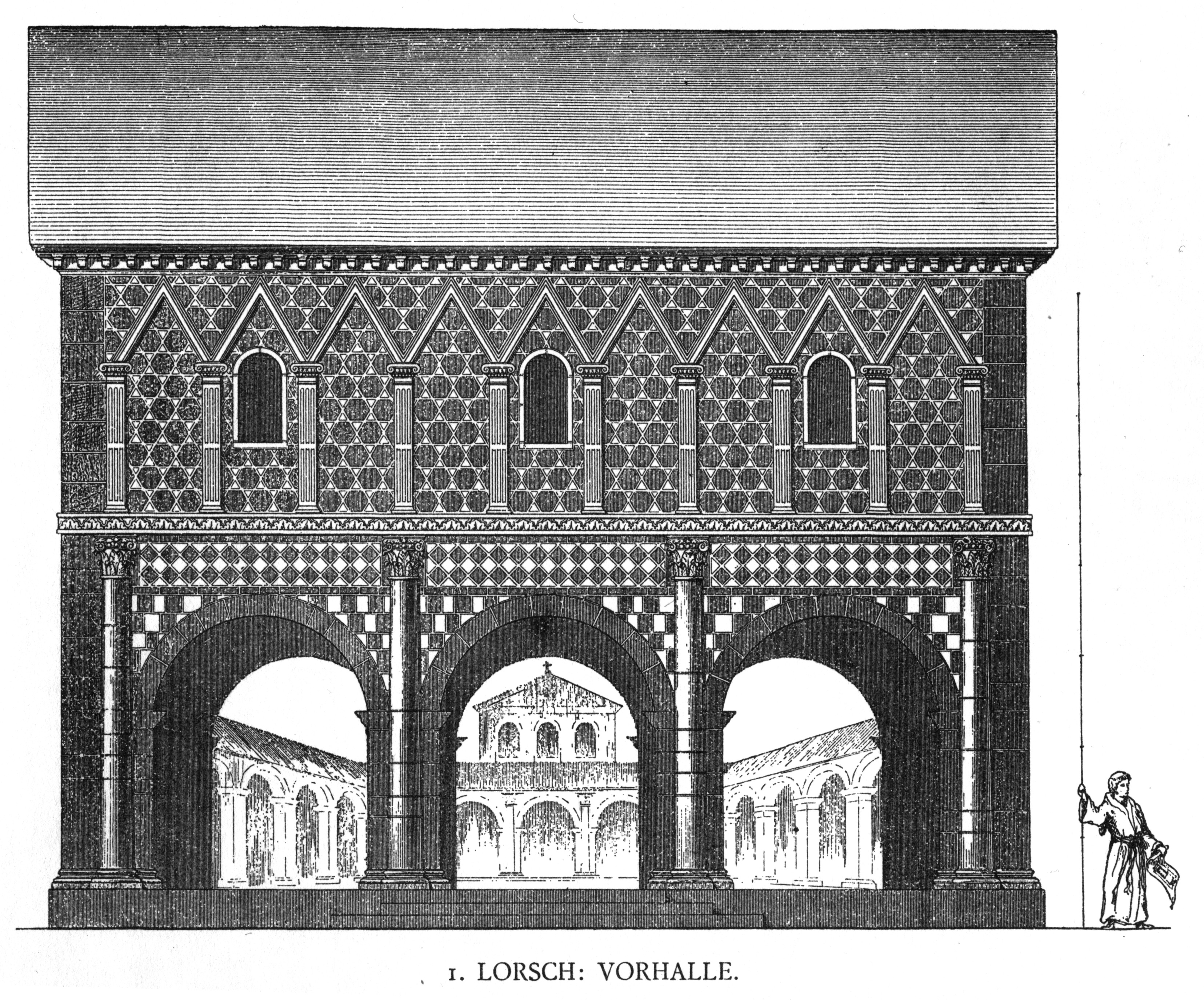 Lorsch, Torhalle.